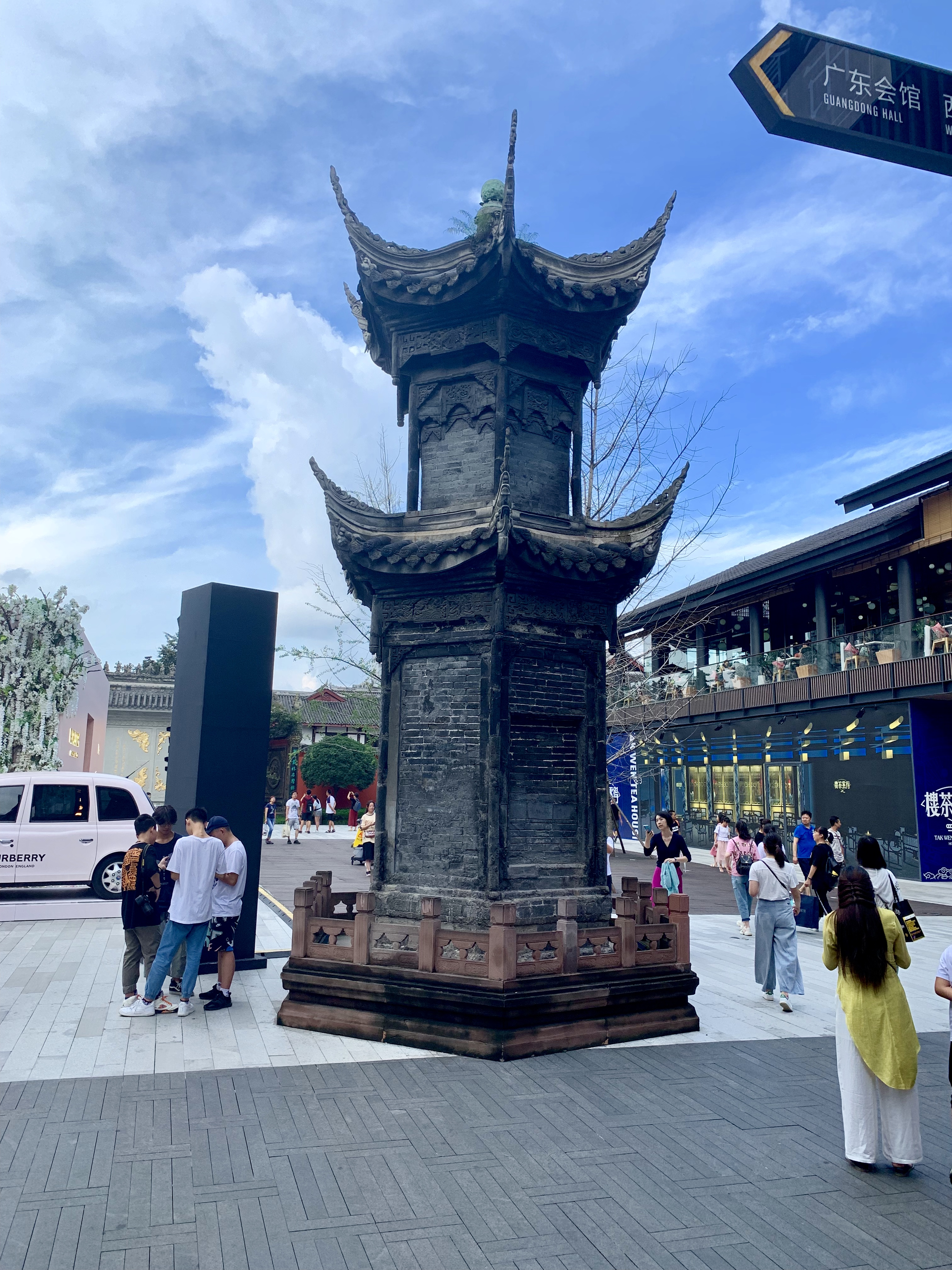 成都太古里内字库塔